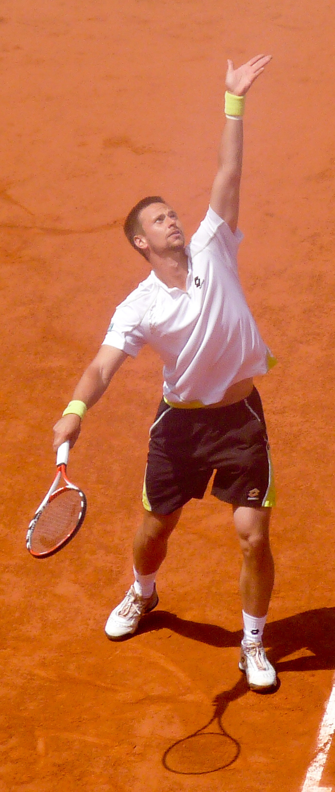 Robin Söderling against Fernando González in the 2009 French Open semifinals